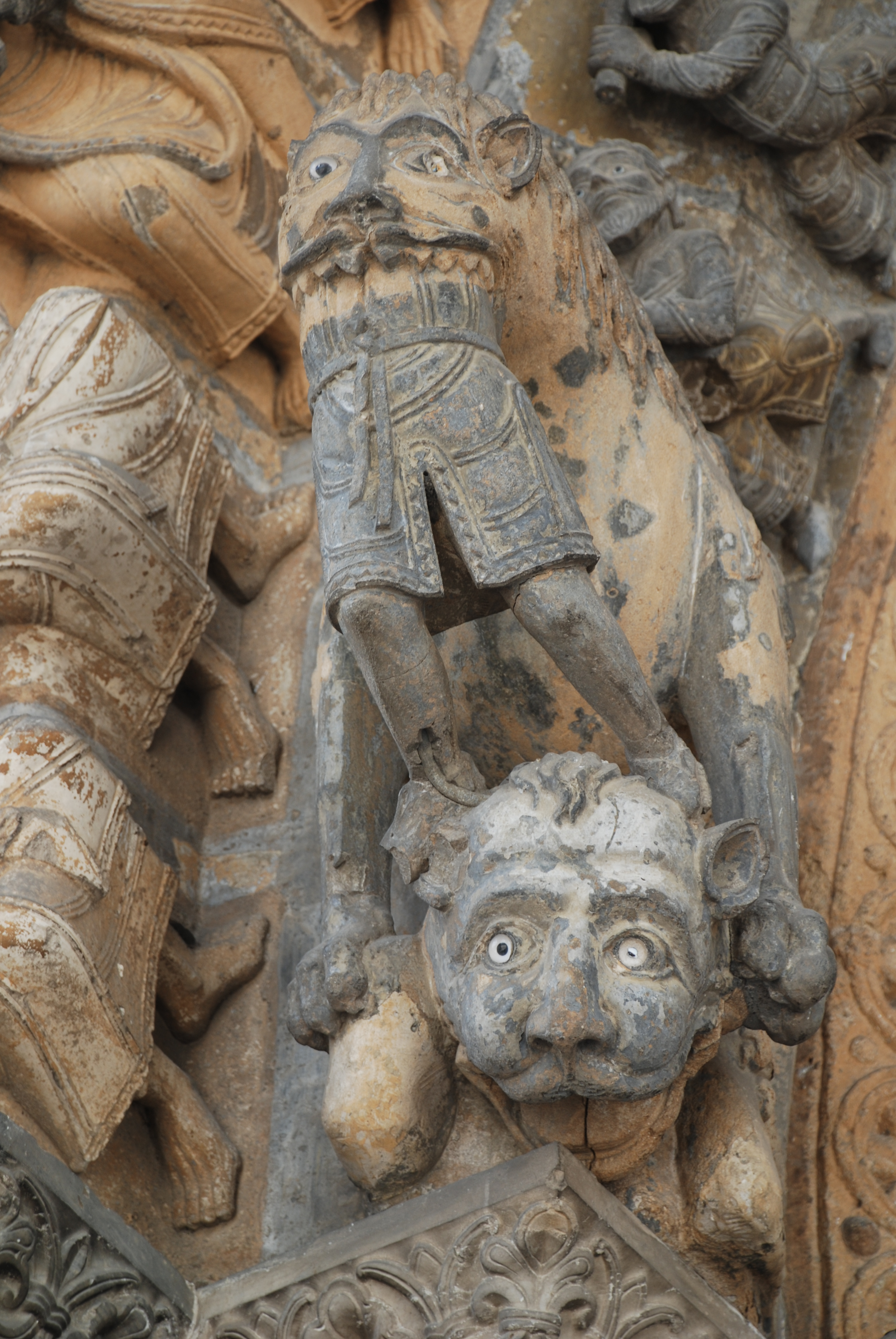 Détail du portail